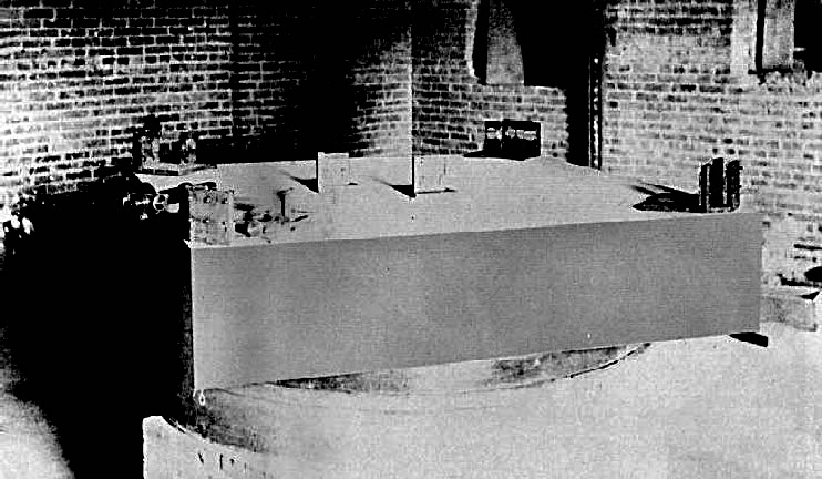 The Setup of Michelson Morley experiment in 1887 at what is now Case Western Reserve University.